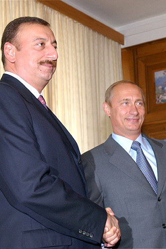 Владимир Путин с Премьер-министром Азербайджана Ильхамом Алиевым.